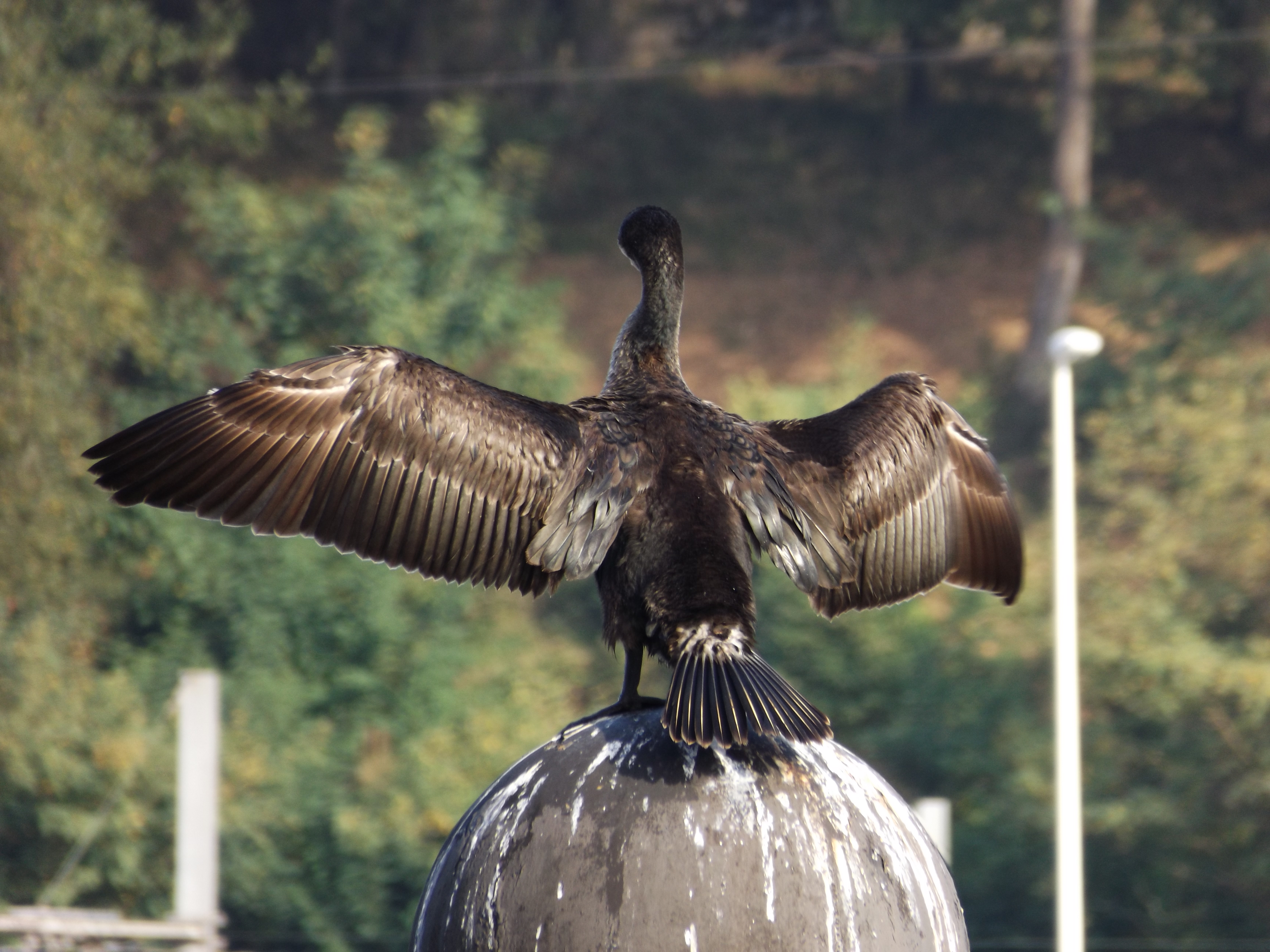 Grand Cormoran, Bayonne, Adour, Phalacrocorax carbo, Great Cormorant